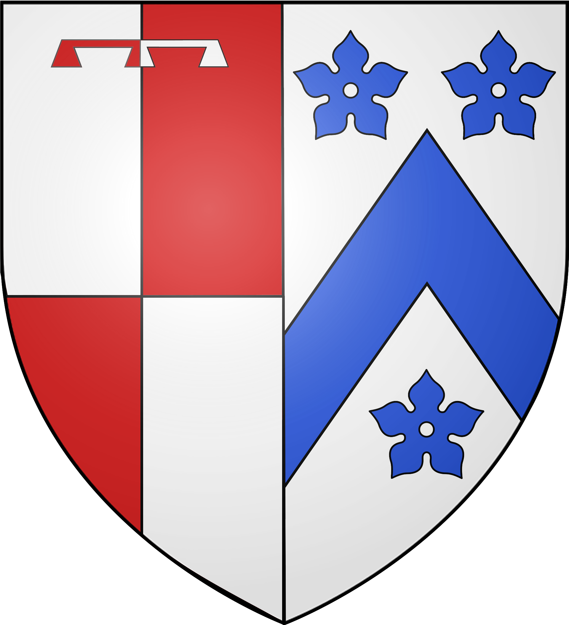 Ajustement du précédent blason car en 1 et 4 c'est d'argent et en 2 et 3 de gueules. Parti : au I, écartelé d'argent et de gueules, au lambel de l'un en l'autre; au II, d'argent, au chevron d'azur, acc. de trois quintefeuilles du même.